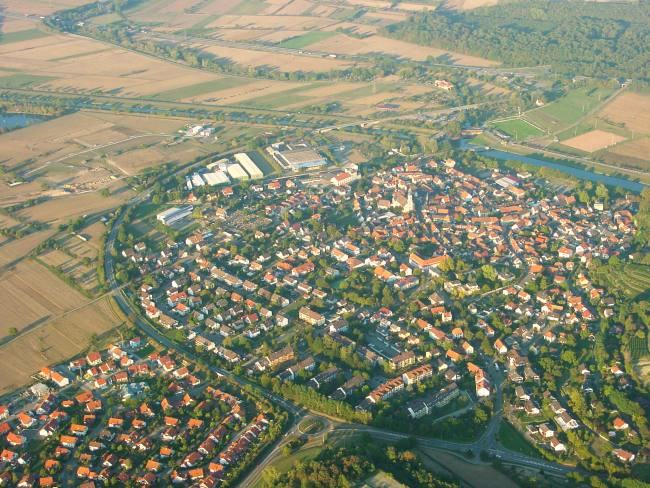 Luftbild von Riegel am Kaiserstuhl aufgenommen bei einer Ballonfahrt